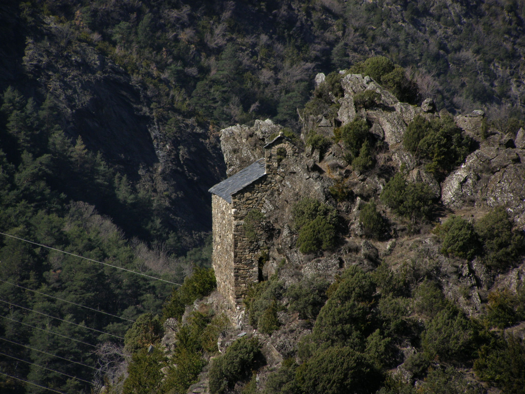 Vista de l'esglèsia, completament enganxada a la roca.